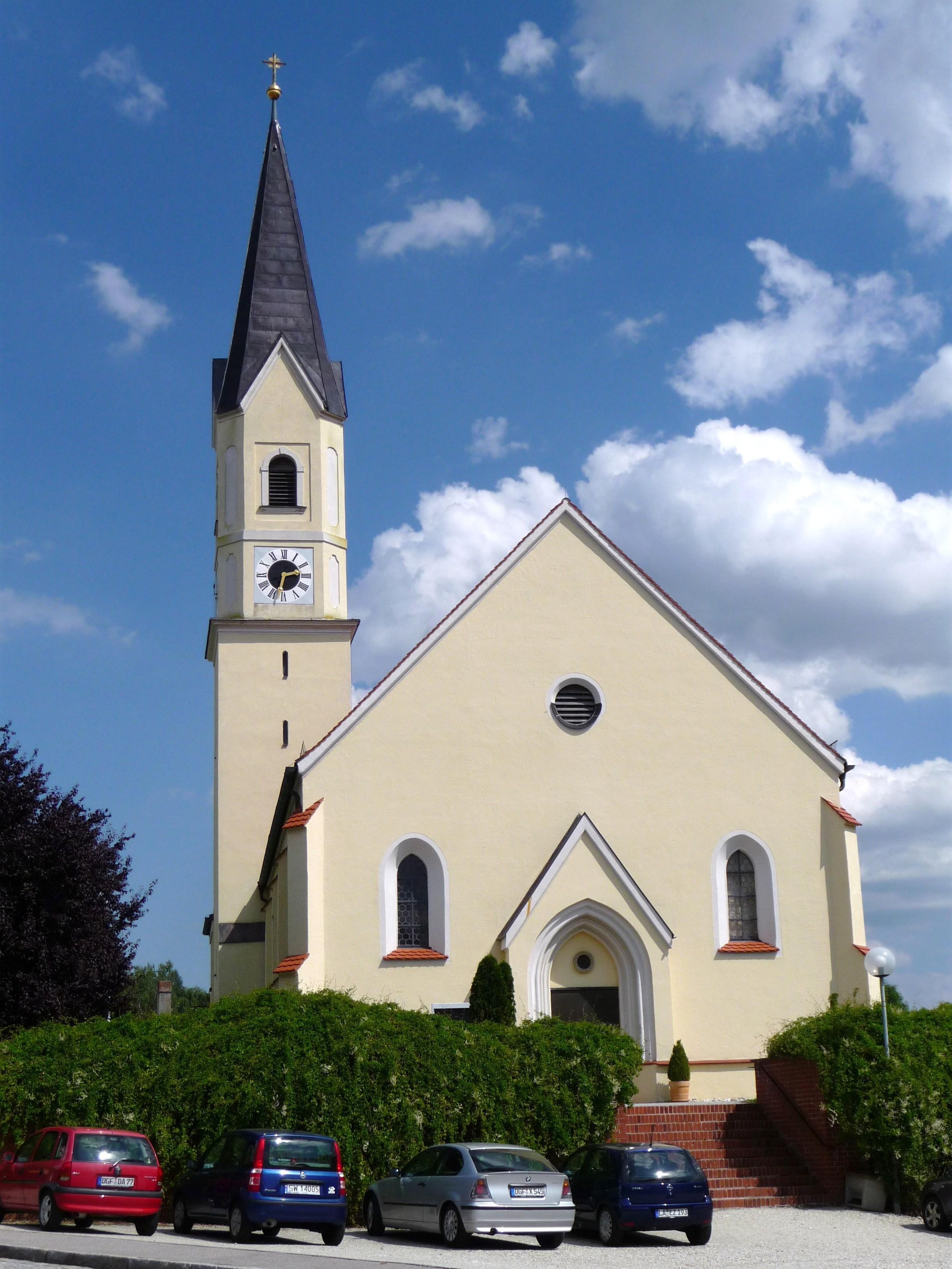 Die Pfarrkirche Mariä Himmelfahrt in Postau